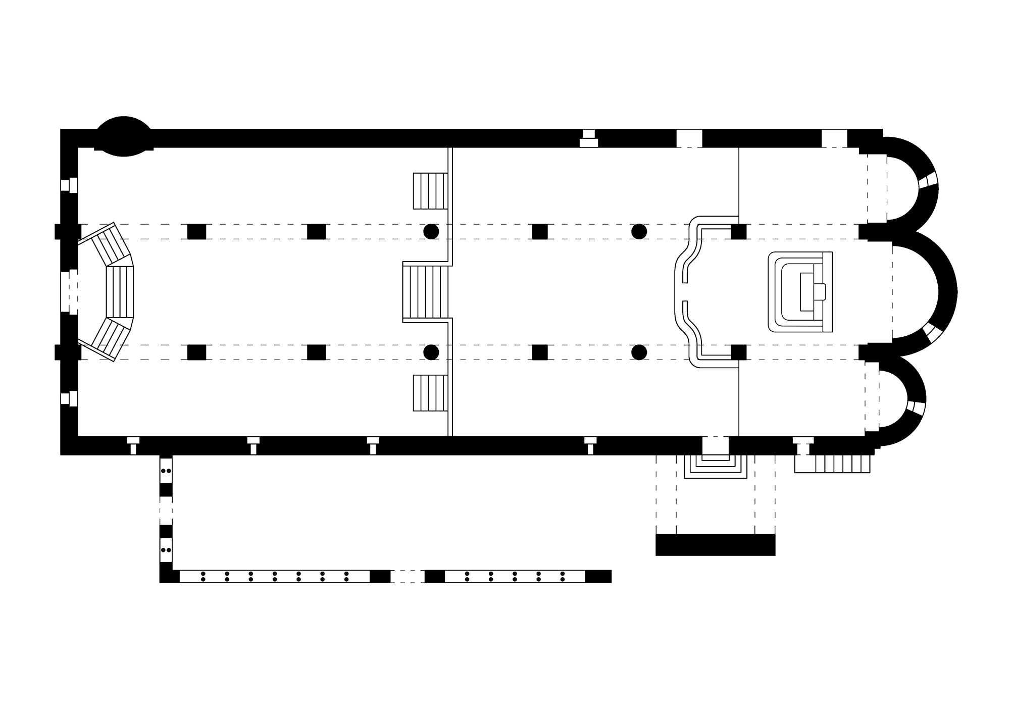 Planimetria ridisegnata del piano terra della Chiesa